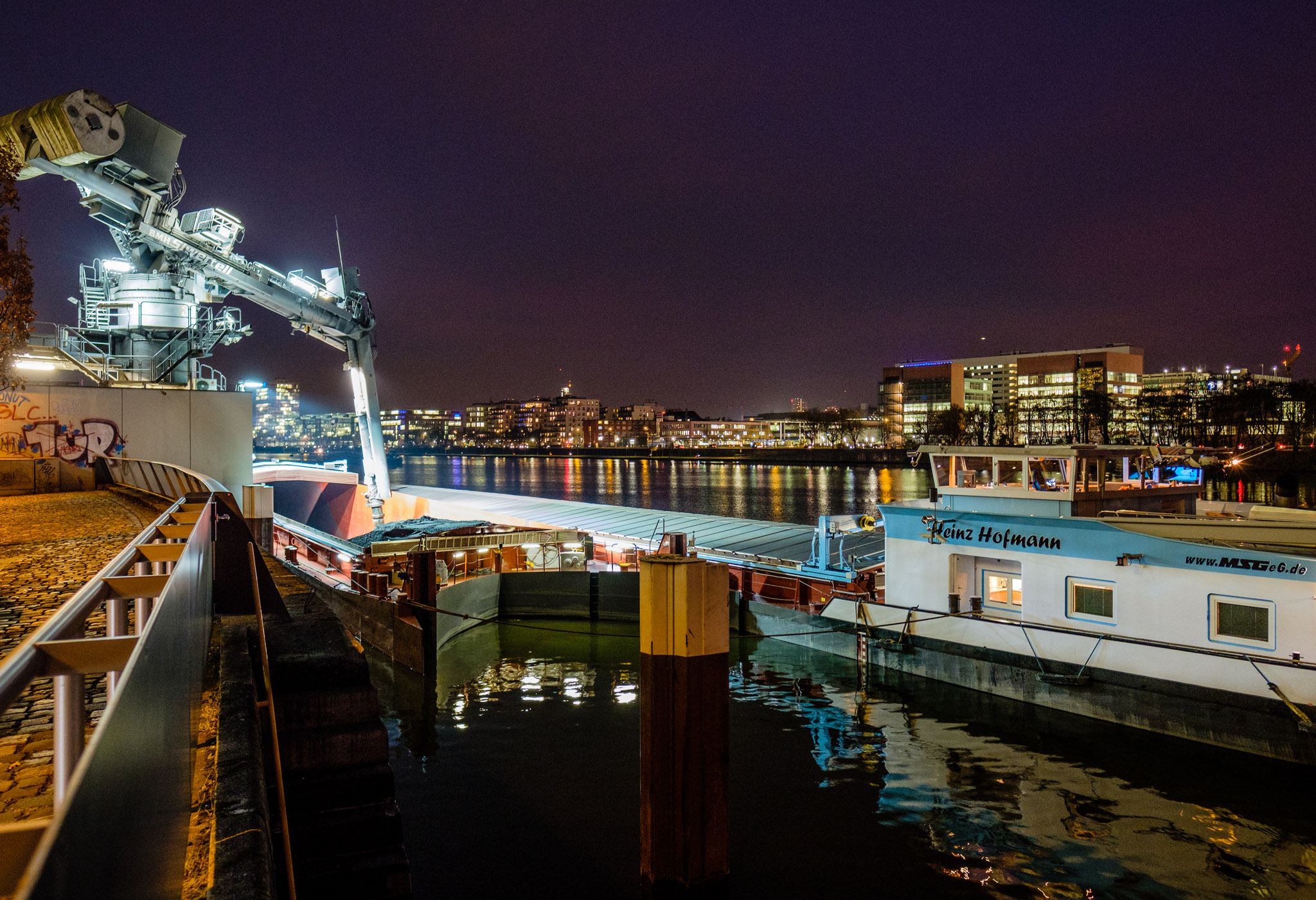 Die Kohlebrücke beim Entladen eines Schiffes.